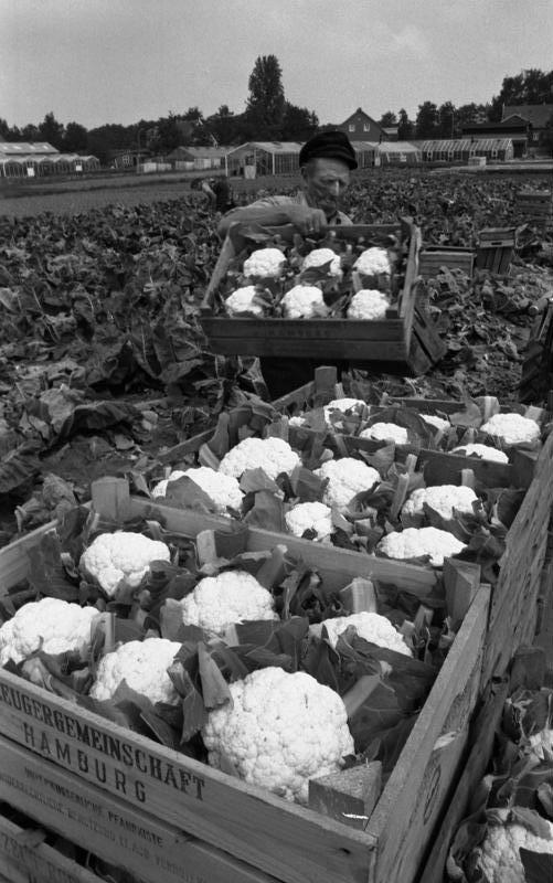 Hamburg Gemüseanbau in den Marschlanden